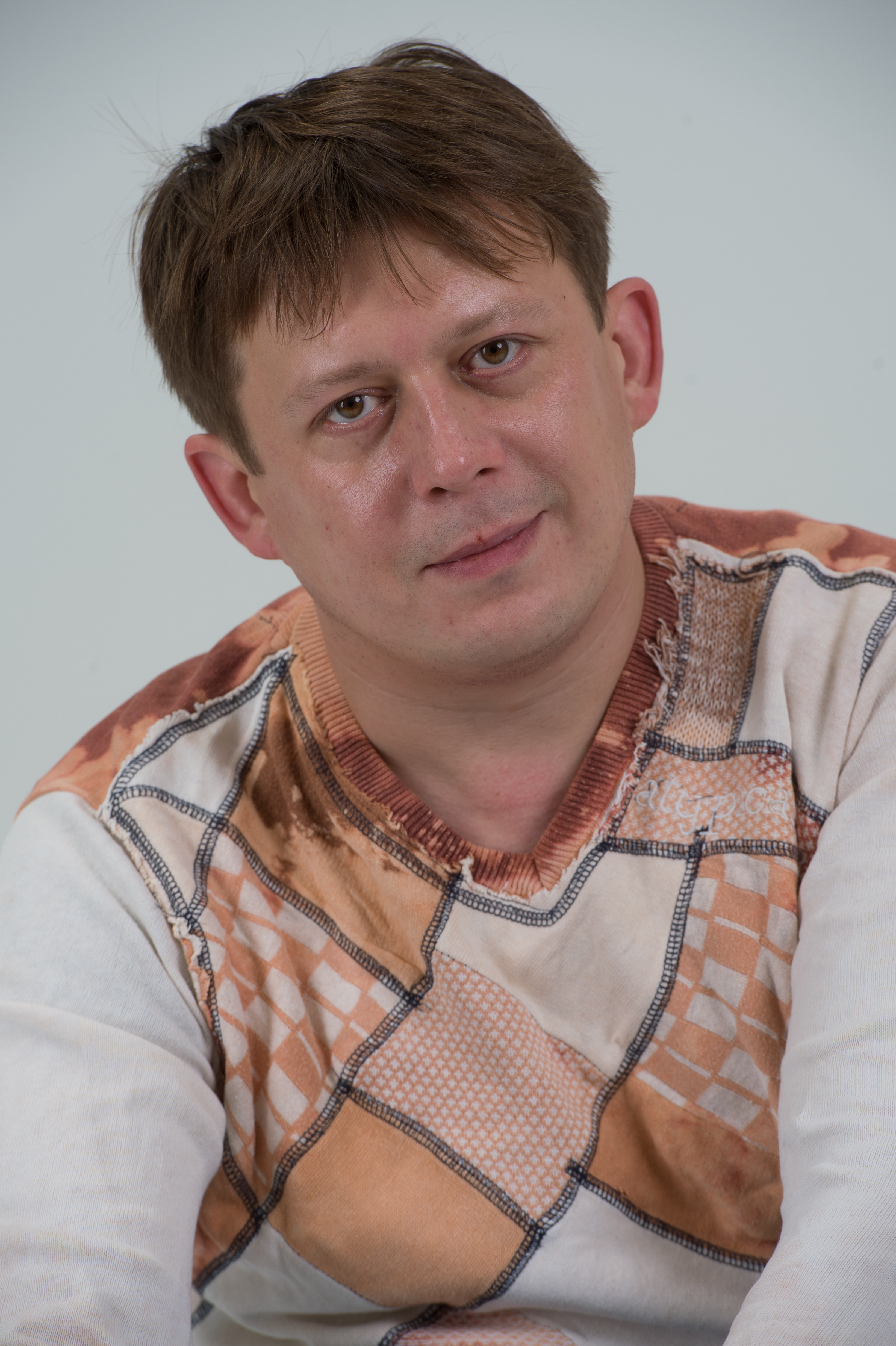 Krister Kivi